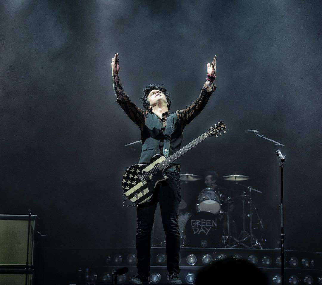 Billie Joe Armstrong Live 2017